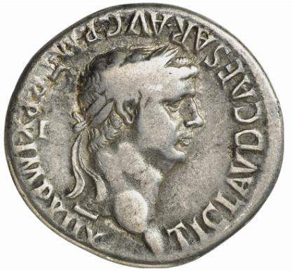 Изображение Клавдия на монете с сайта